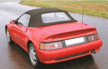 Bildbeschreibung:1992er Lotus Elan in Stuttgart Quelle:A.Wart (Benutzer; Enthusiast, eigenes Foto) Fotograf:A.Wart Datum:11.10.2002 Sonstiges:JPEG-Bild, Abmessungen; 377 x 240, 34kb Lizenz:Ich stimme der Public-Domain Lizenz zu und veröffentliche das Bild.